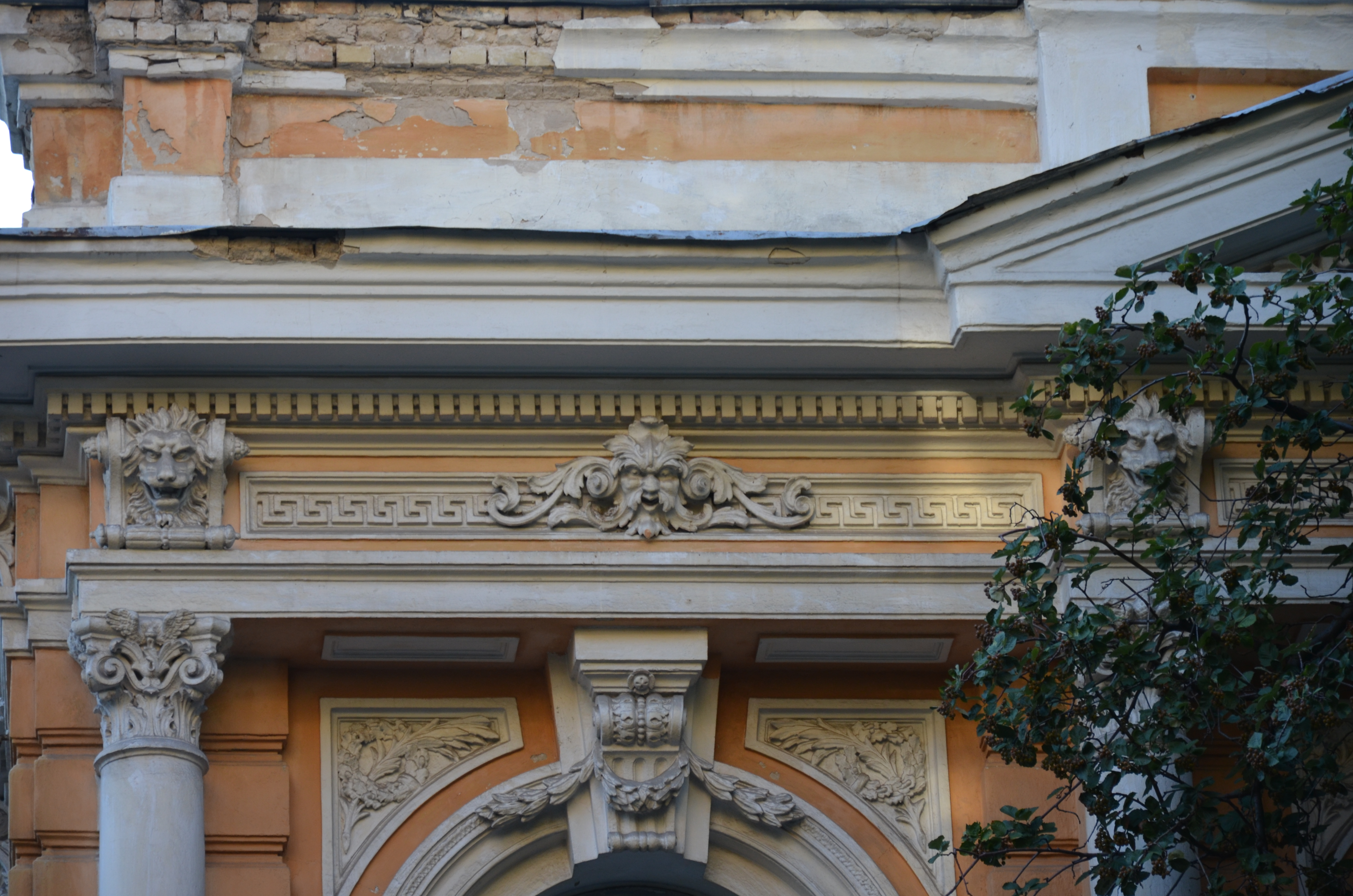 Особняк С. Лібермана, Київ, Банкова вул., 2